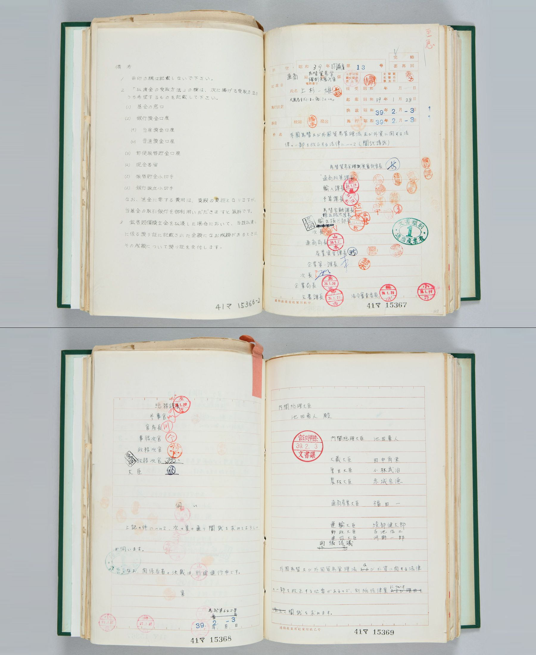 外国為替及び外国貿易管理法及び外資に関する法律の一部を改正する法律について（閣議請議）